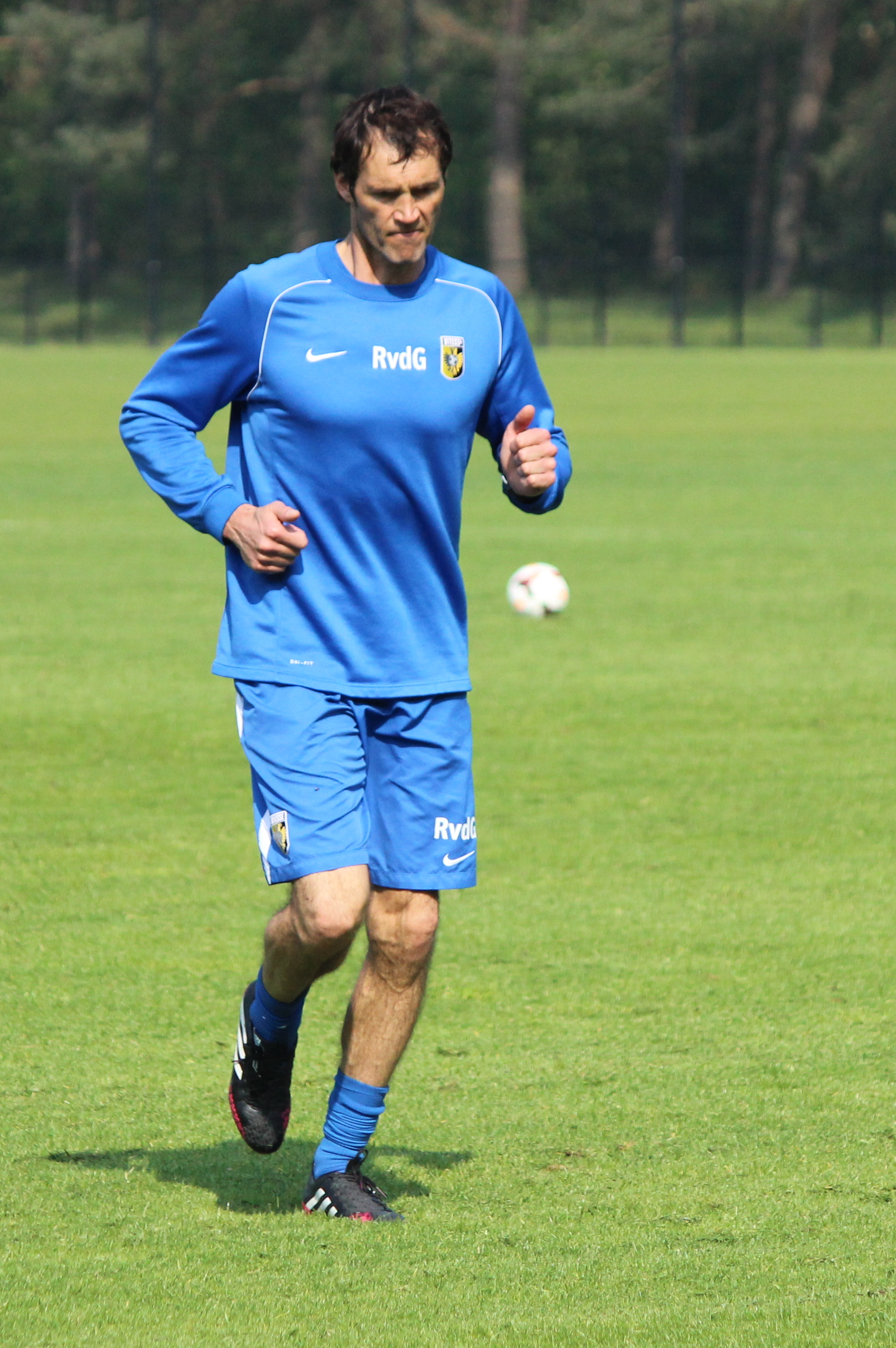 Raimond van der Gouw tijdens een training van Vitesse